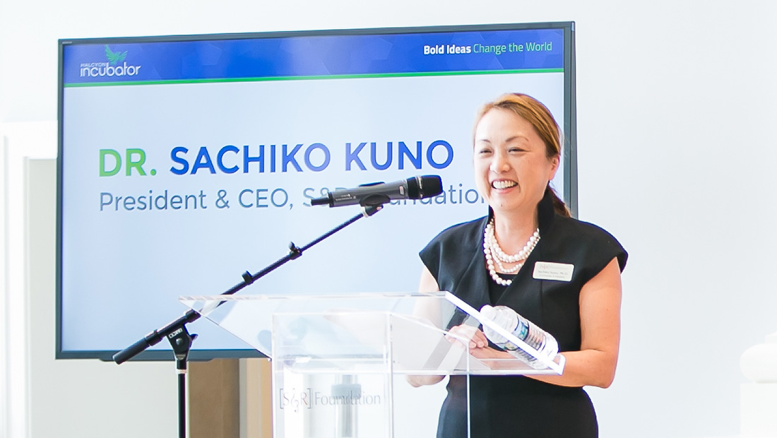 Halcyon Incubator - Fall Kick-Off 2014